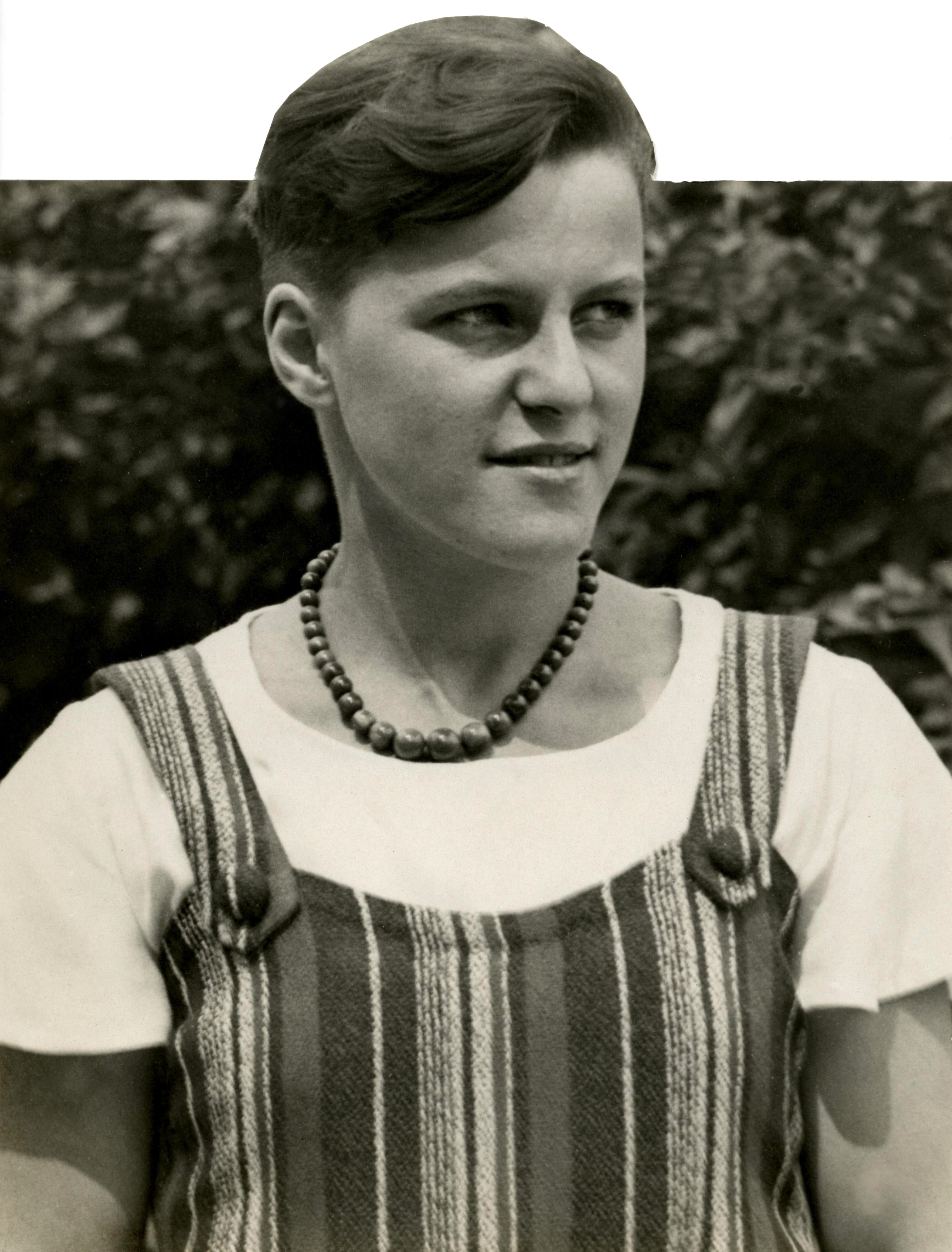 Portret van Johanna Dalmolen hardloopster en lid van het Nederlands estafette-team, voor de Olympische spelen van 1932.